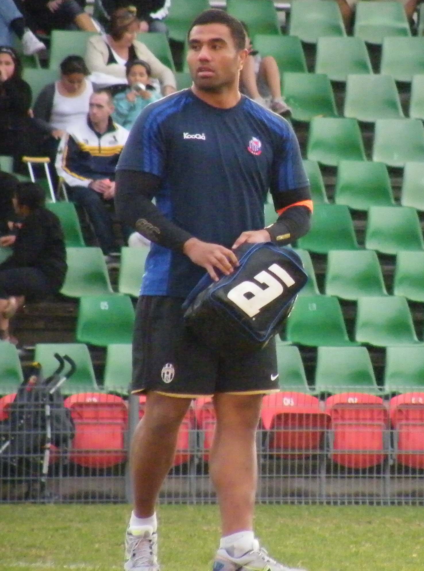 Wycliff Palu of Manly RUFC